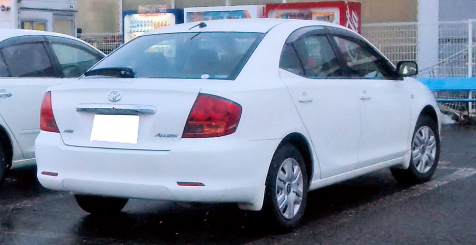 トヨタ・アリオン